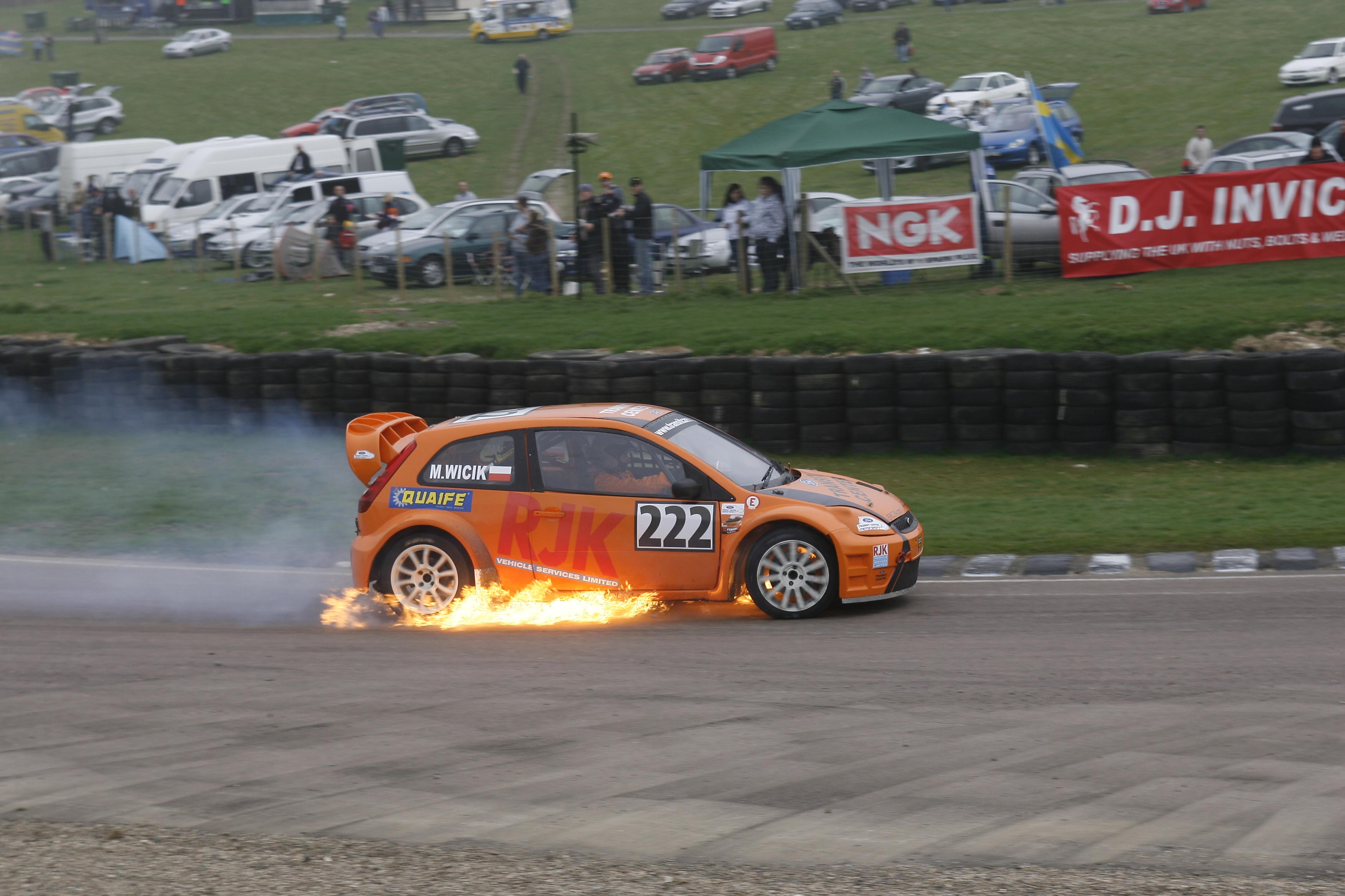 2.0 Duratec, 250KM, 255Nm, DTA PRO-40